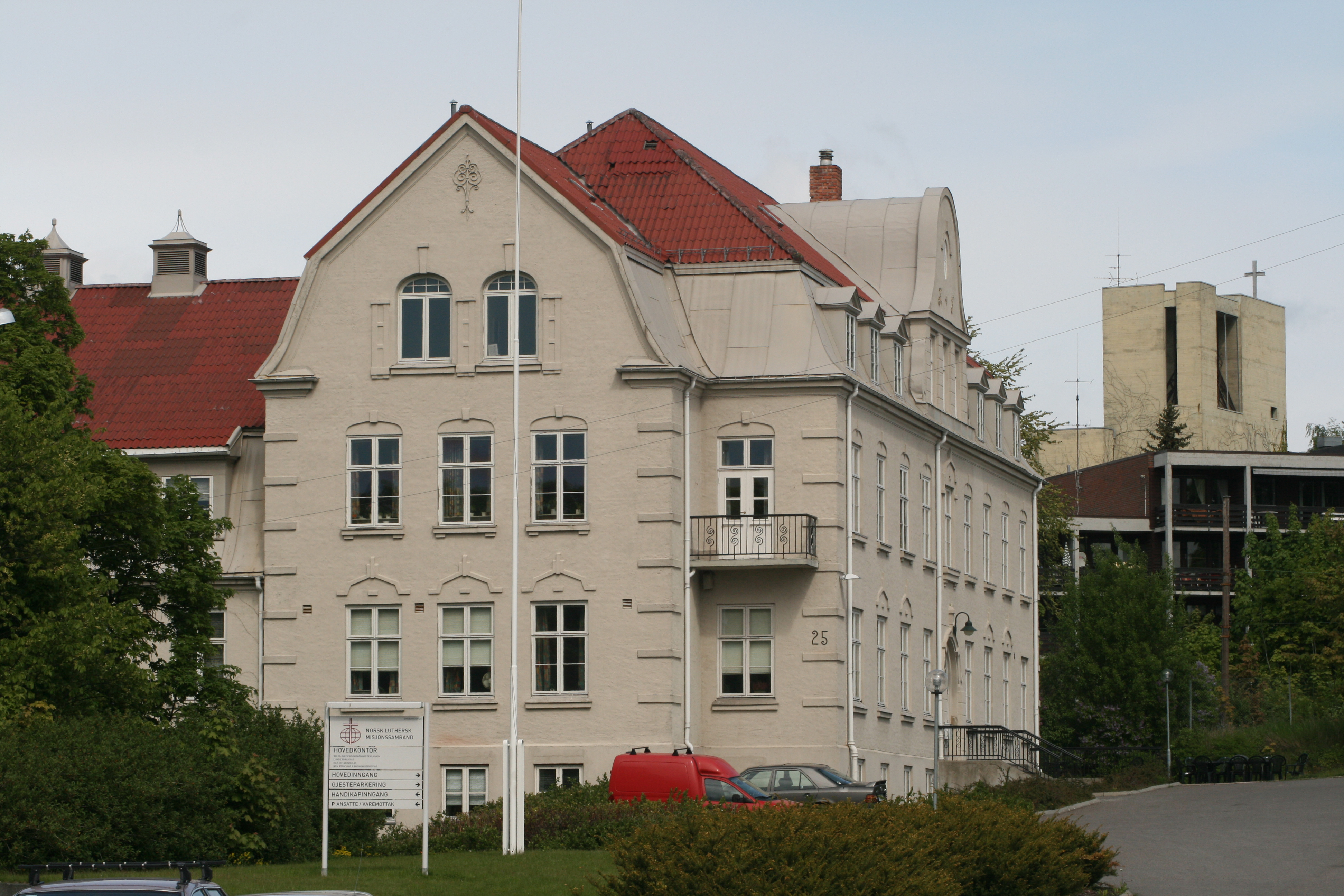 Sinsenveien 25 (Oslo) – Norsk Luthersk Misjonssamband